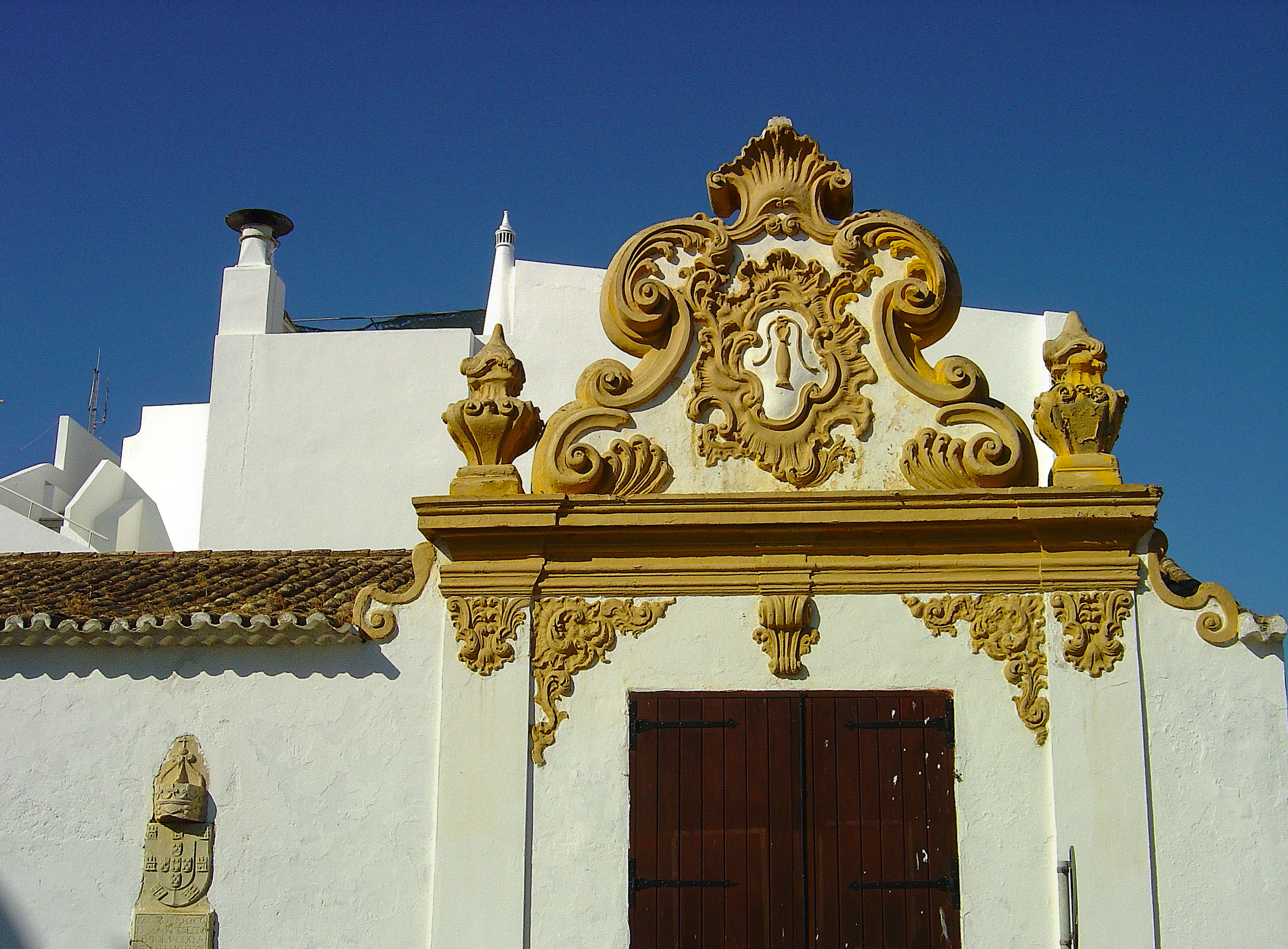 Edifício construído em 1665 pelo Conde de Avintes, Governador do Reino do Algarve, sobre o sítio onde existiria a igreja de S.Brás. Visava o armazenamento dos produtos trazidos pelas naus que aportavam em Lagos. De planta longitudinal, dispõe de um telhado de duas águas sendo a cobertura interior em abóbada de berço. Na fachada voltada para a praça do Infante abrem-se duas portas baixas encimadas pelo escudo de armas do Reino e a chancela do Conde. Integrando a mesma fachada, à direita, ergue-se um dos passos da cidade, rematado por um frontão de traça barroca. See where this picture was taken. [?]